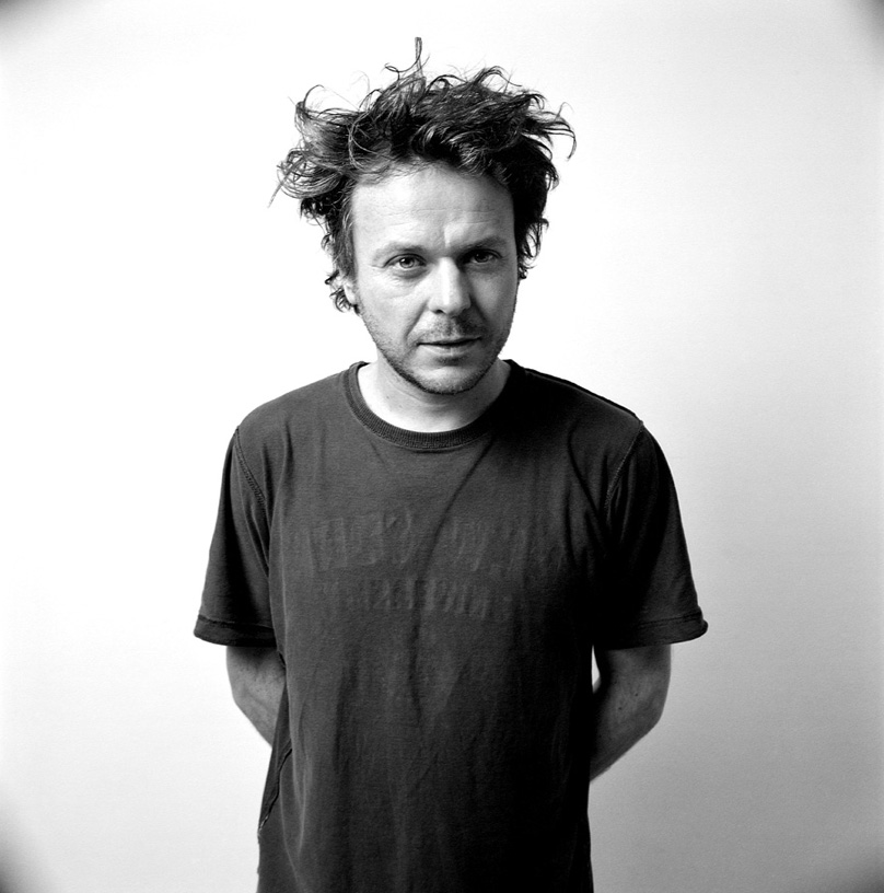 eRikm